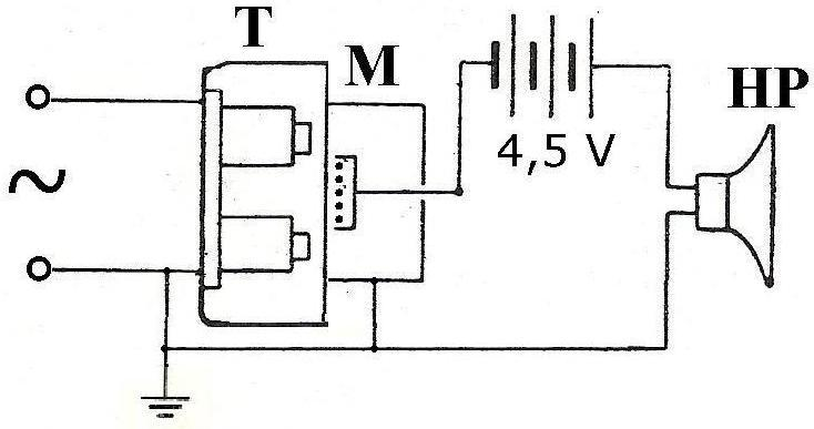 Amplificateur micro téléphonique, (écouteur actionnant un micro au charbon). La figure représente le schéma du montage théorique T est le téléphone de réception ordinaire, M le microphone très sensible influencé et HP le haut-parleur.